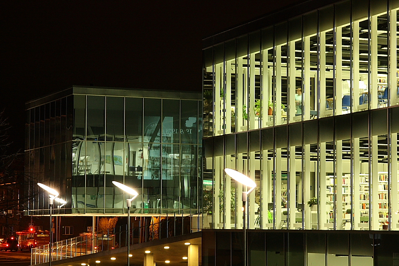 Pärnu raamatukogu